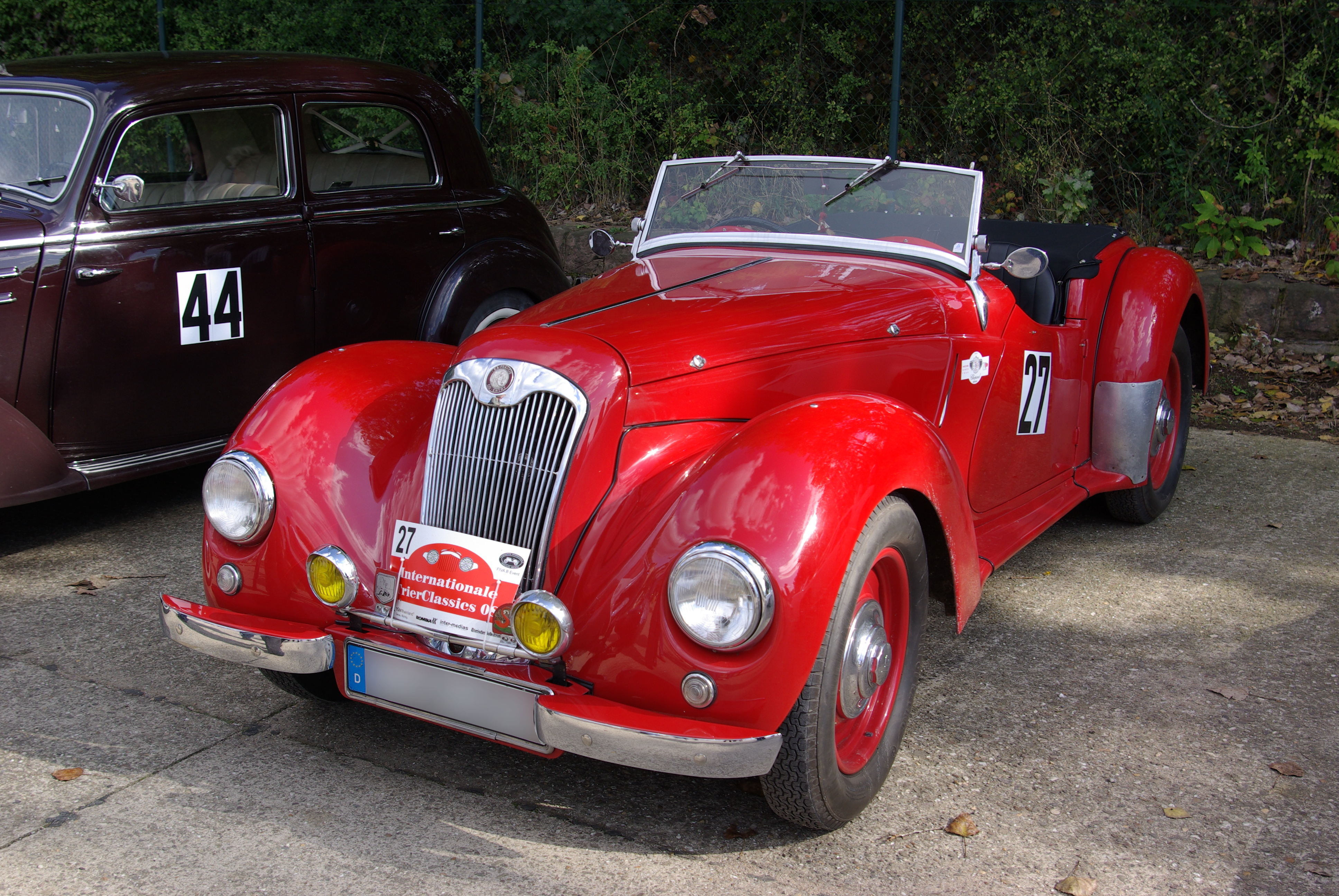 Lea Francis HP 14 Sports Baujahr 1949